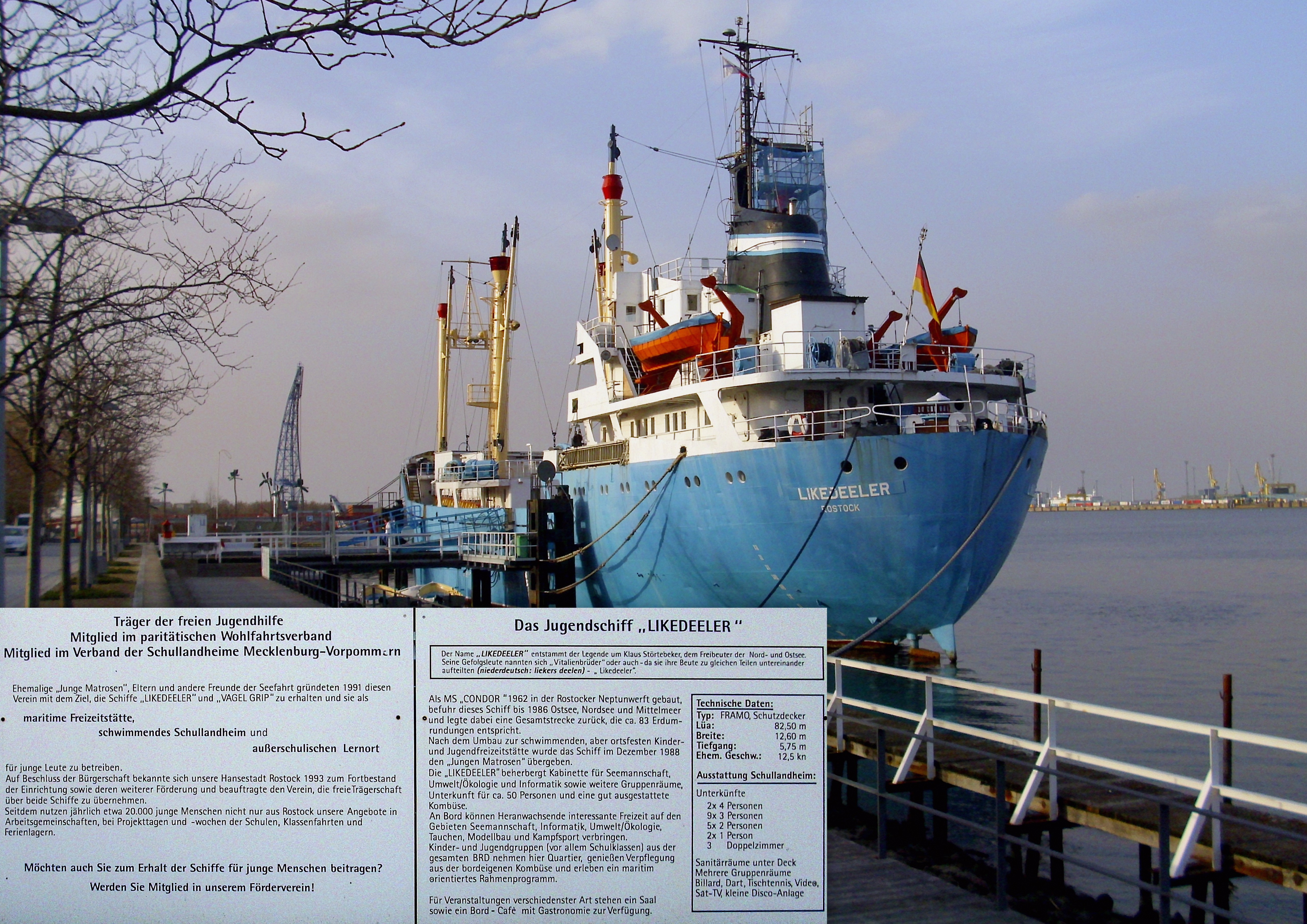 Schullandheim auf dem Wasser "Likedeeler" - Wohnen, Essen und Erleben für Familien, Schulklassen und Jugendgruppen auf einem Schiff